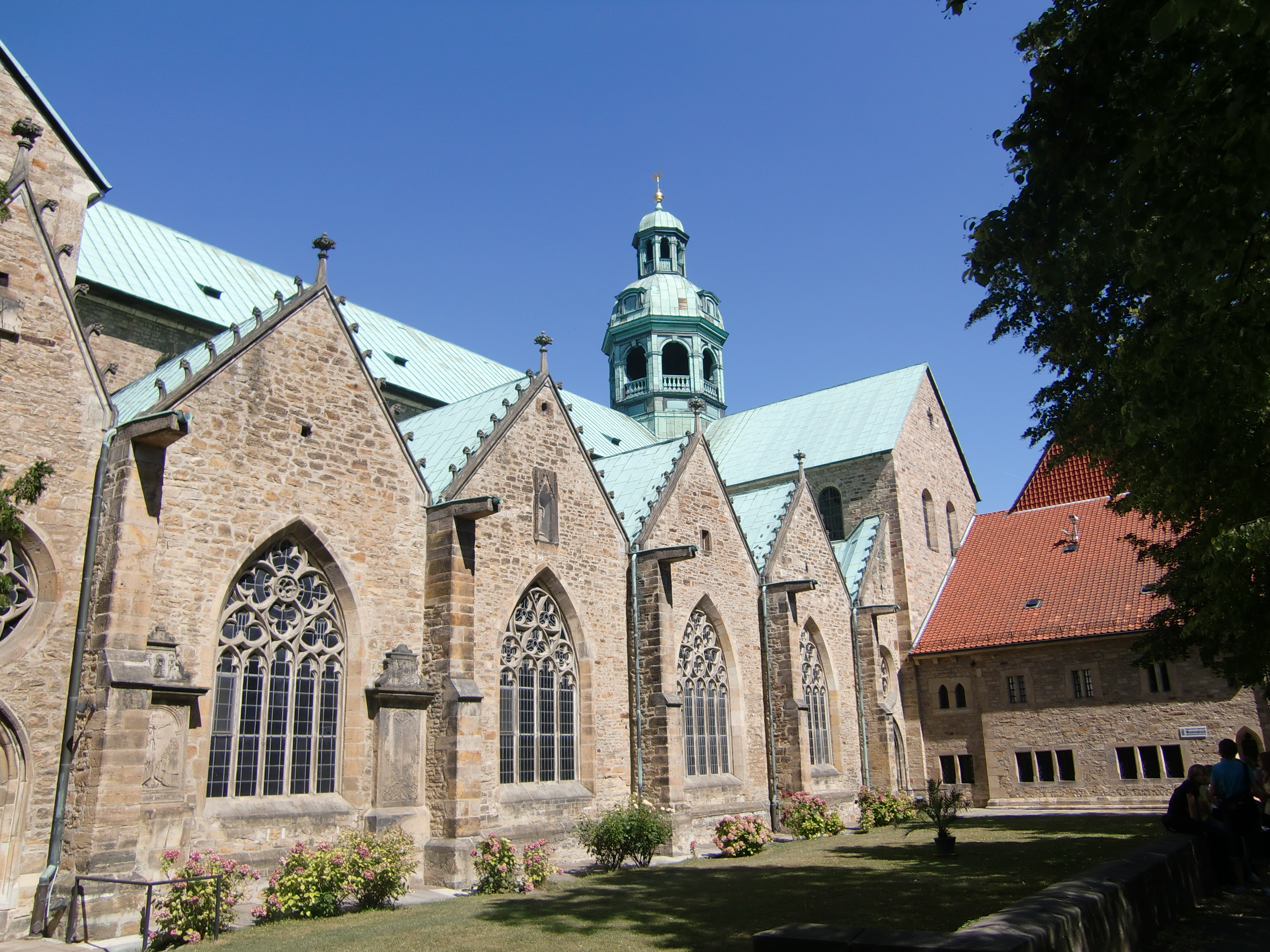 Dom zu Hildesheim, Südansicht